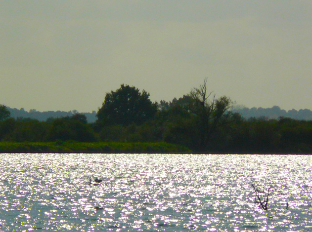 Le lac de Grand Lieu à Passay, La Chevrolière, Loire-Atlantique, France